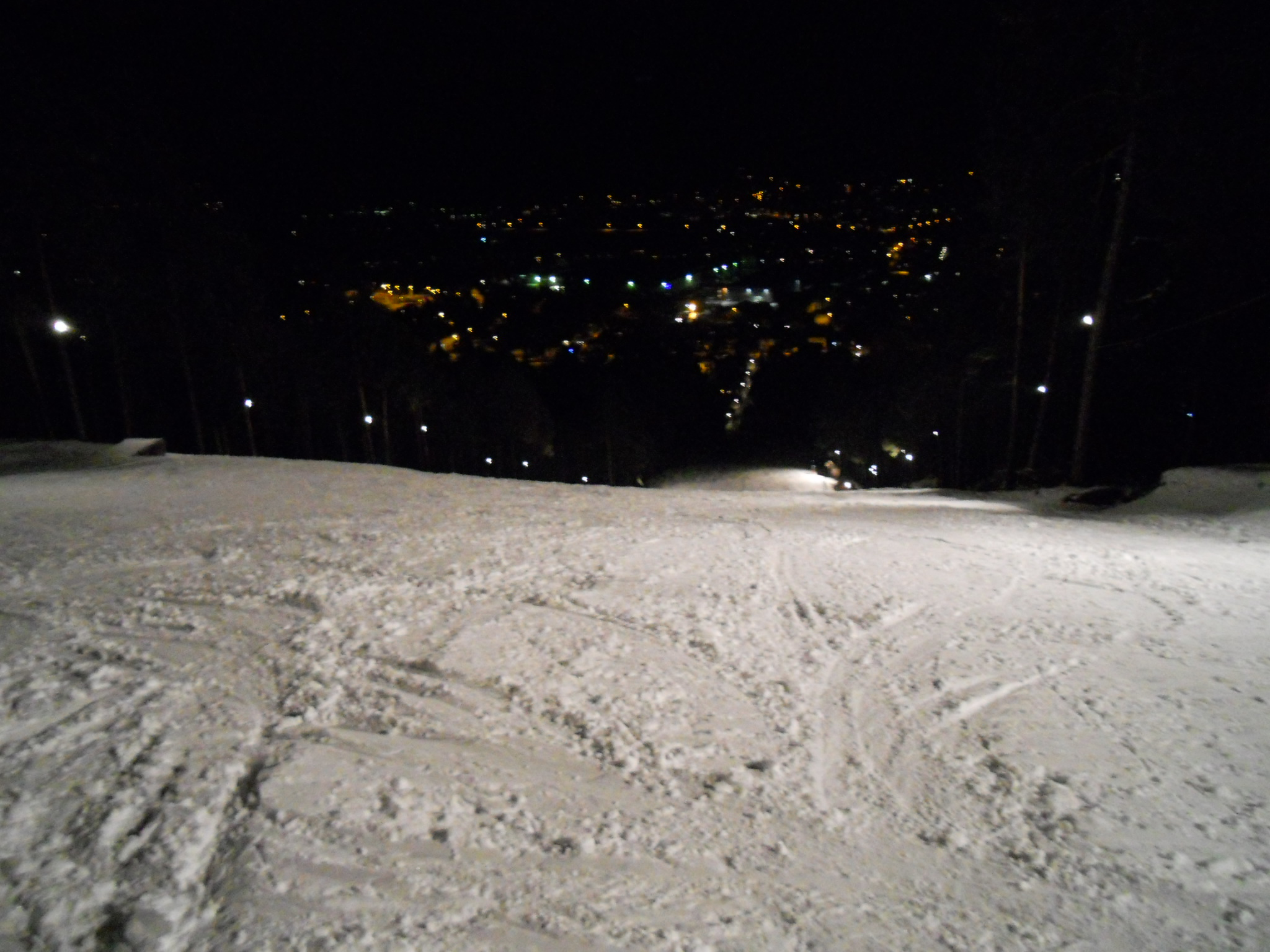 Pogled na Poseko v Guncljah med edinim smučarskim večerom v sezoni 2011/2012